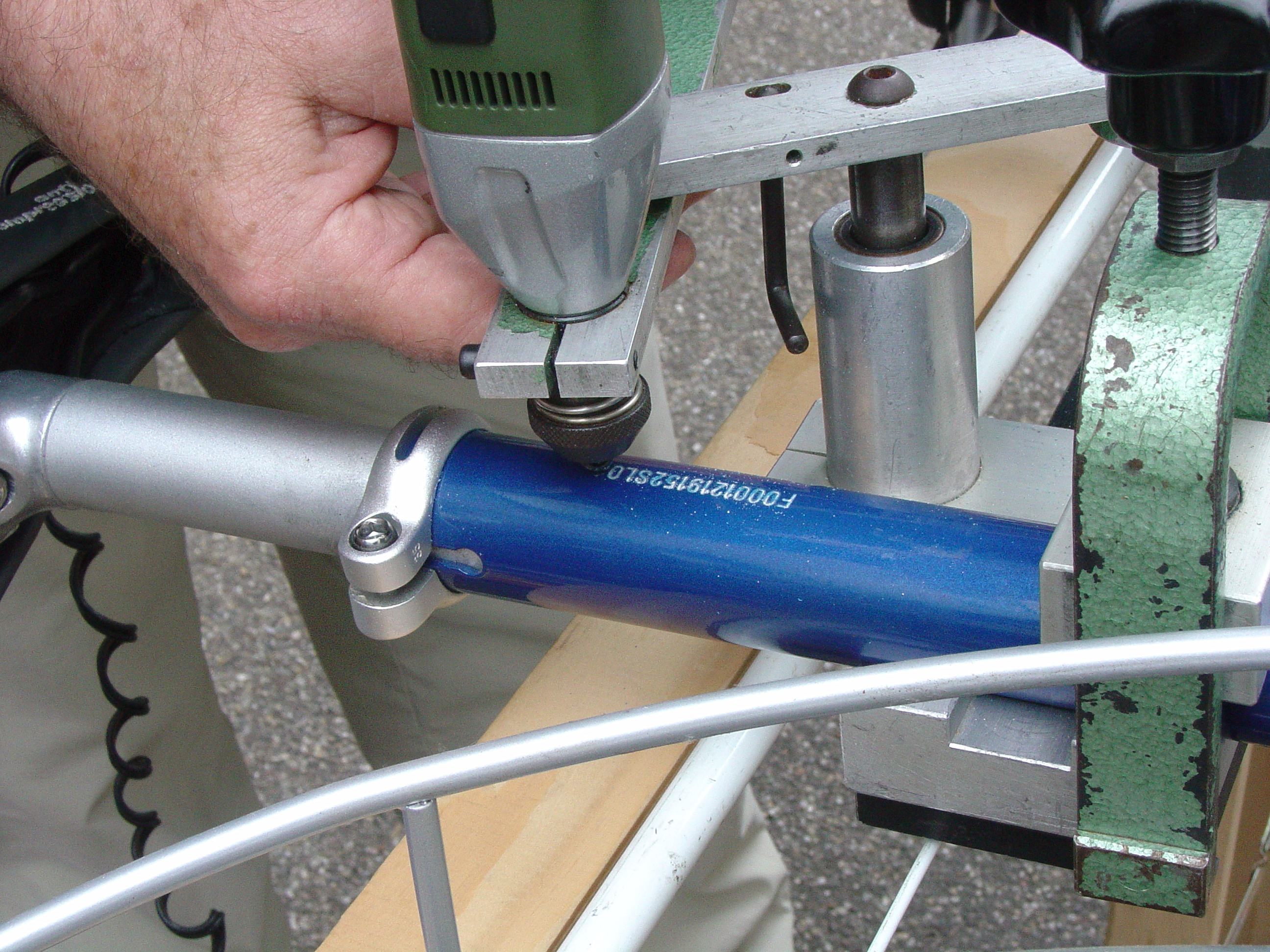 Ein Fahrrad wird mit einem Kirba-Gravurgerät nach dem FEIN-System codiert eigene Aufnahme vom 5.6.2004